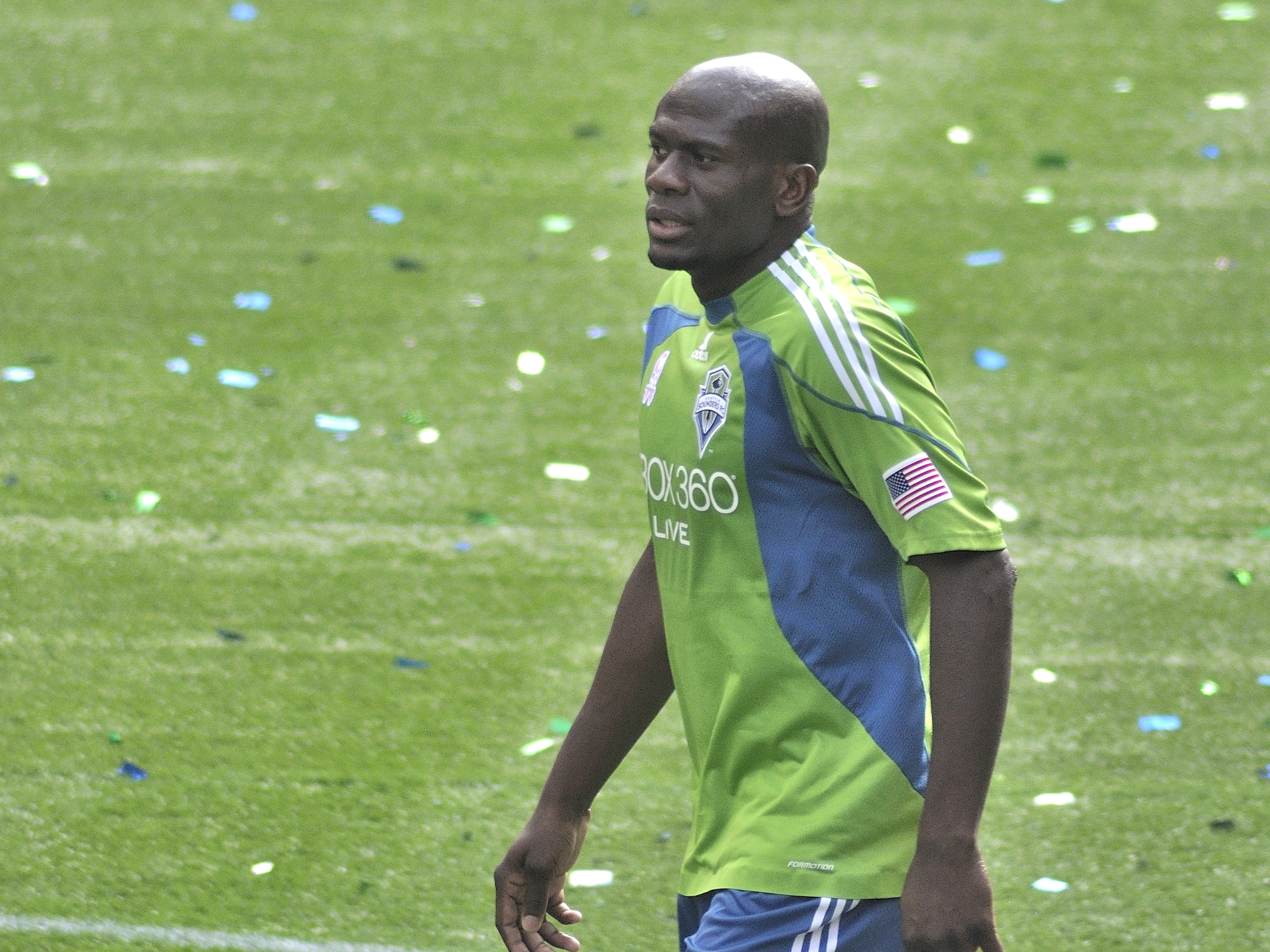 SSFC v Toronto_011